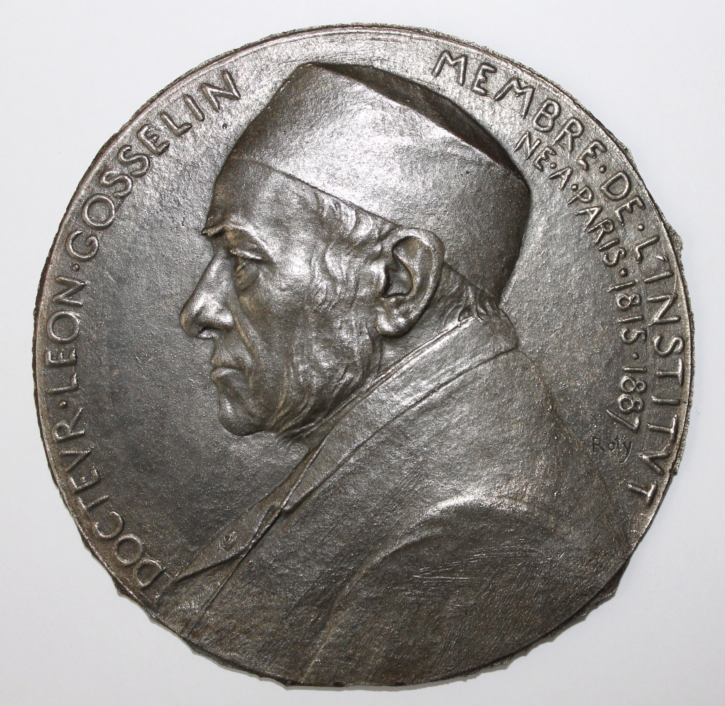 Médaille fondue (98 mm) du docteur Léon Gosselin, membre de l'Institut par Oscar Roty en 1888. (Collection personnelle)